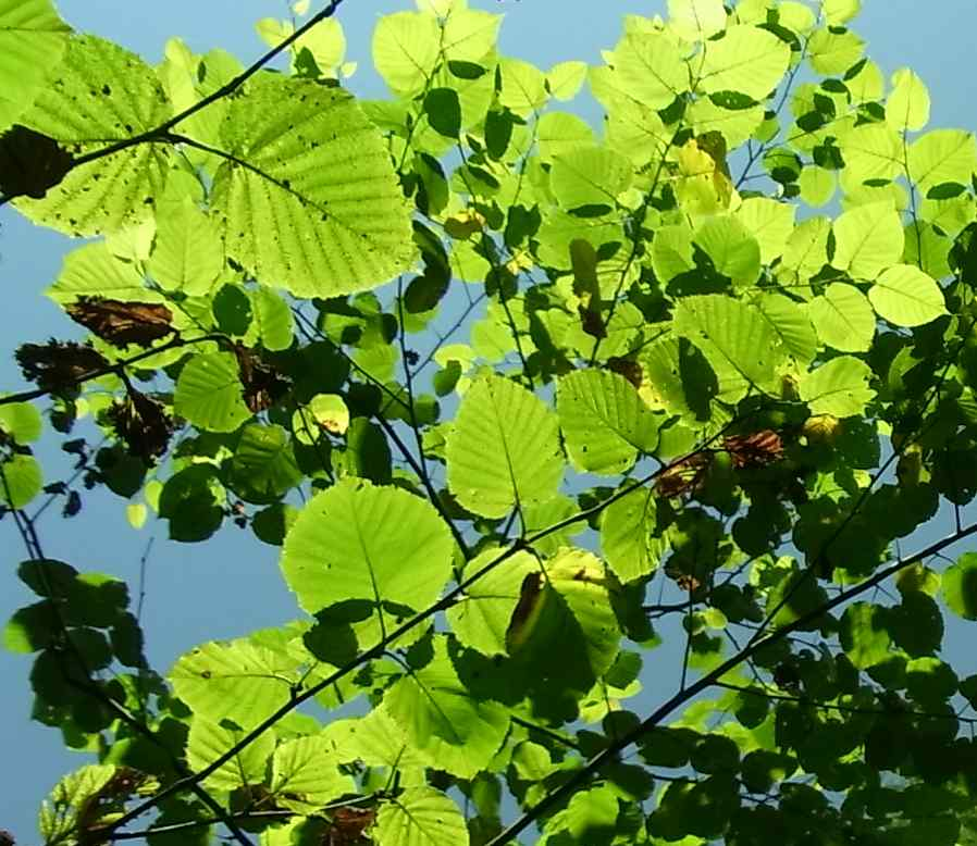 ウダイカンバ